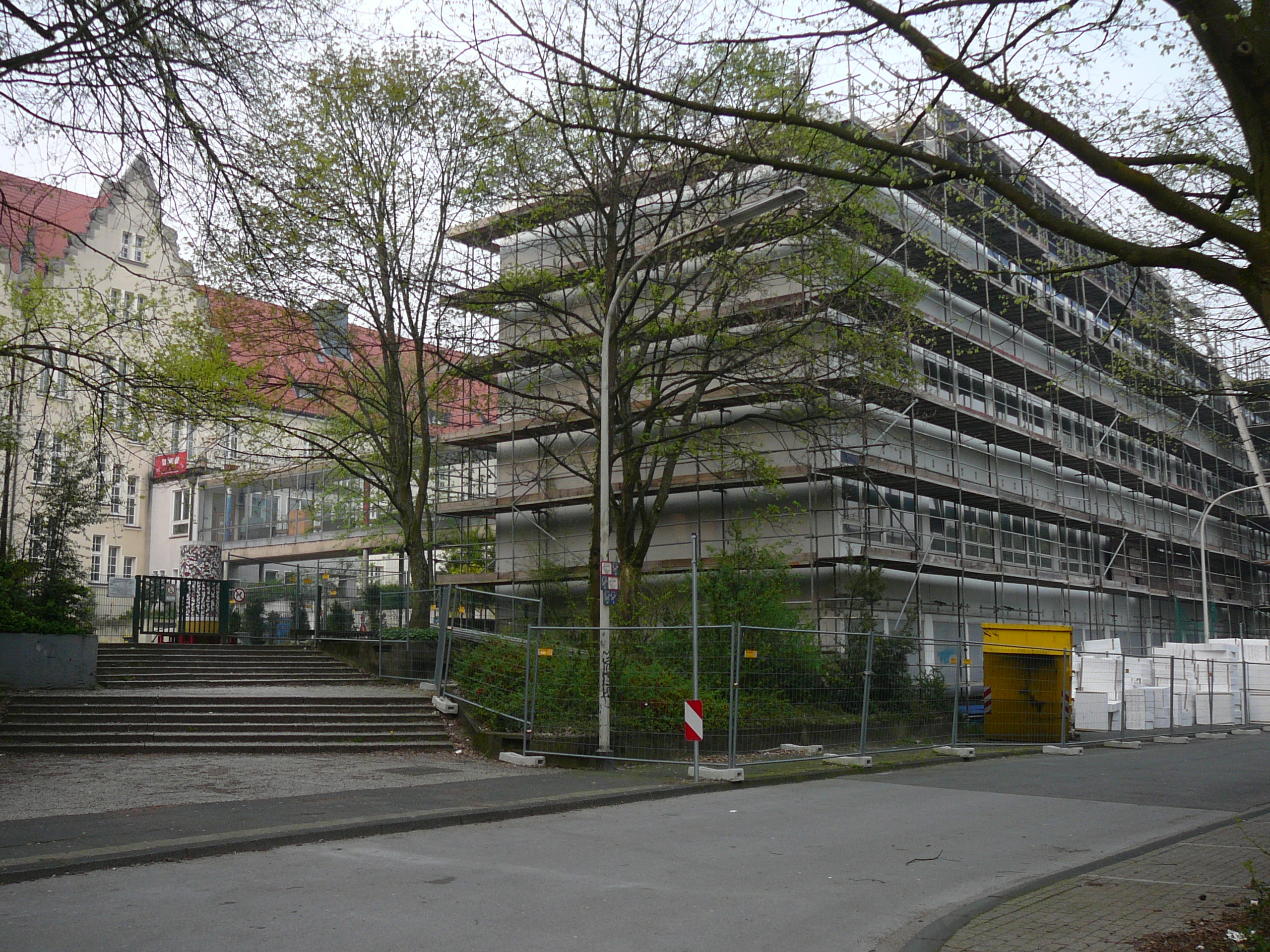 Beethovenstraße, Wuppertal